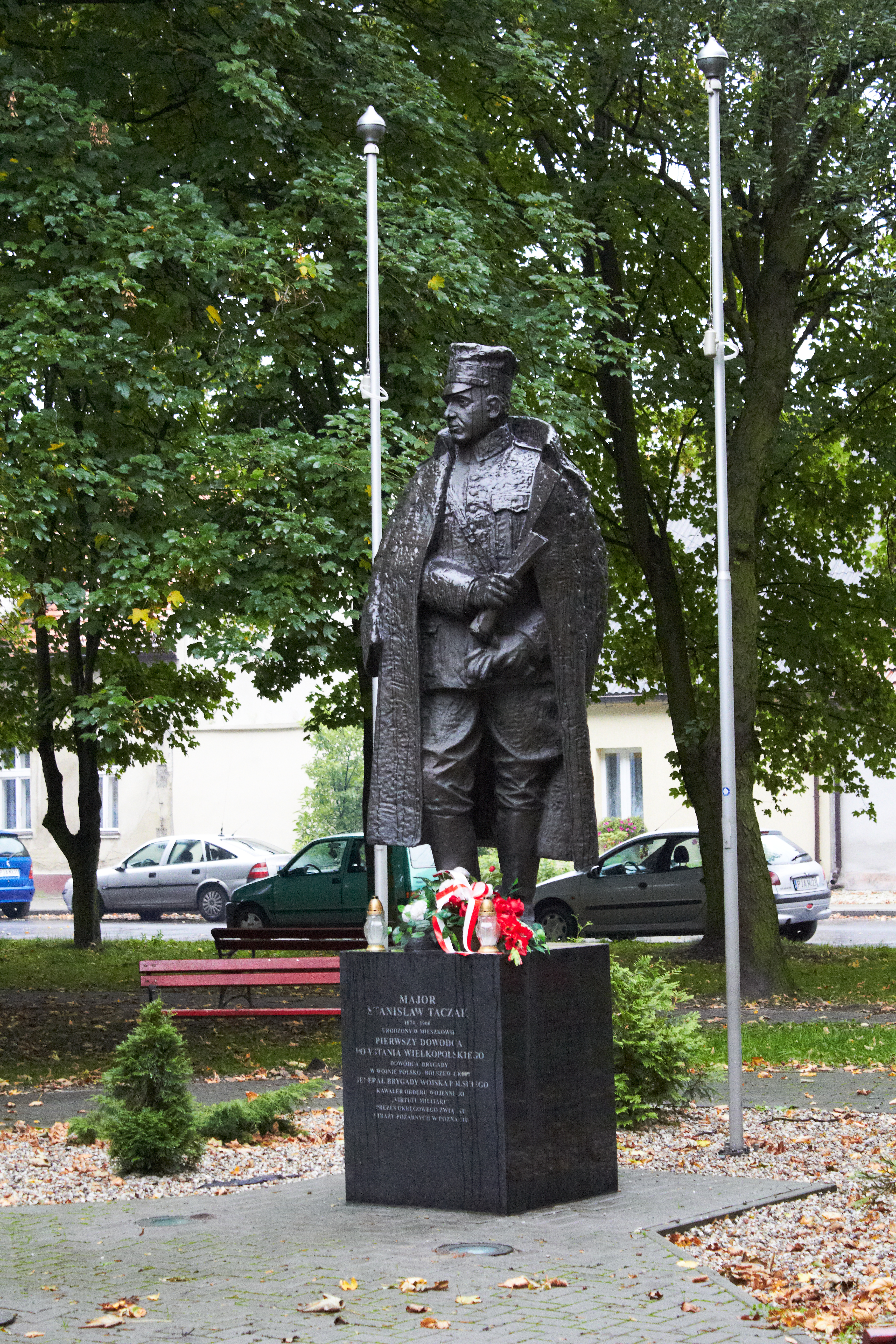 Mieszków, park, 2 poł. XVIII